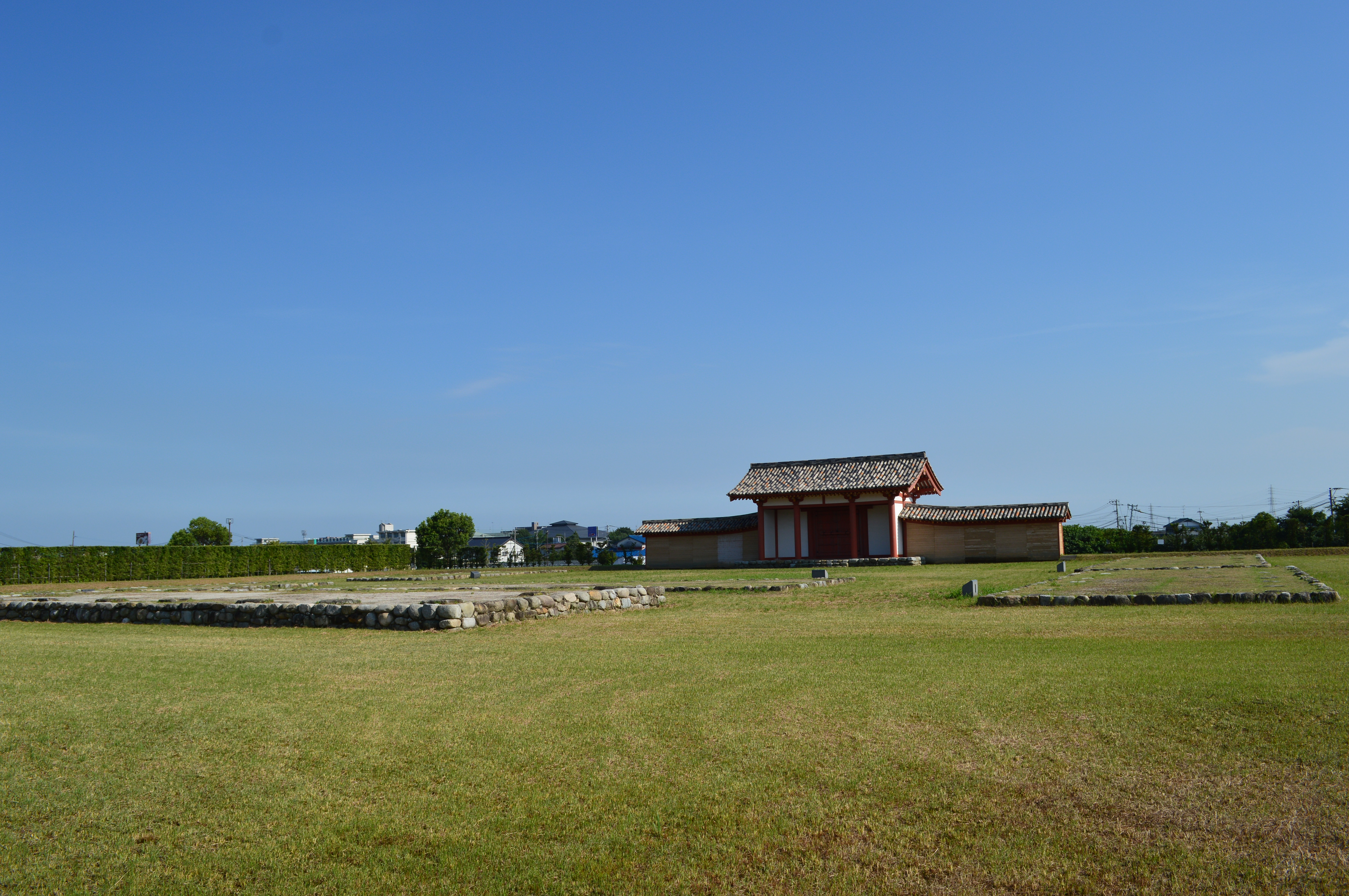 肥前国庁跡 全景 (後方より)